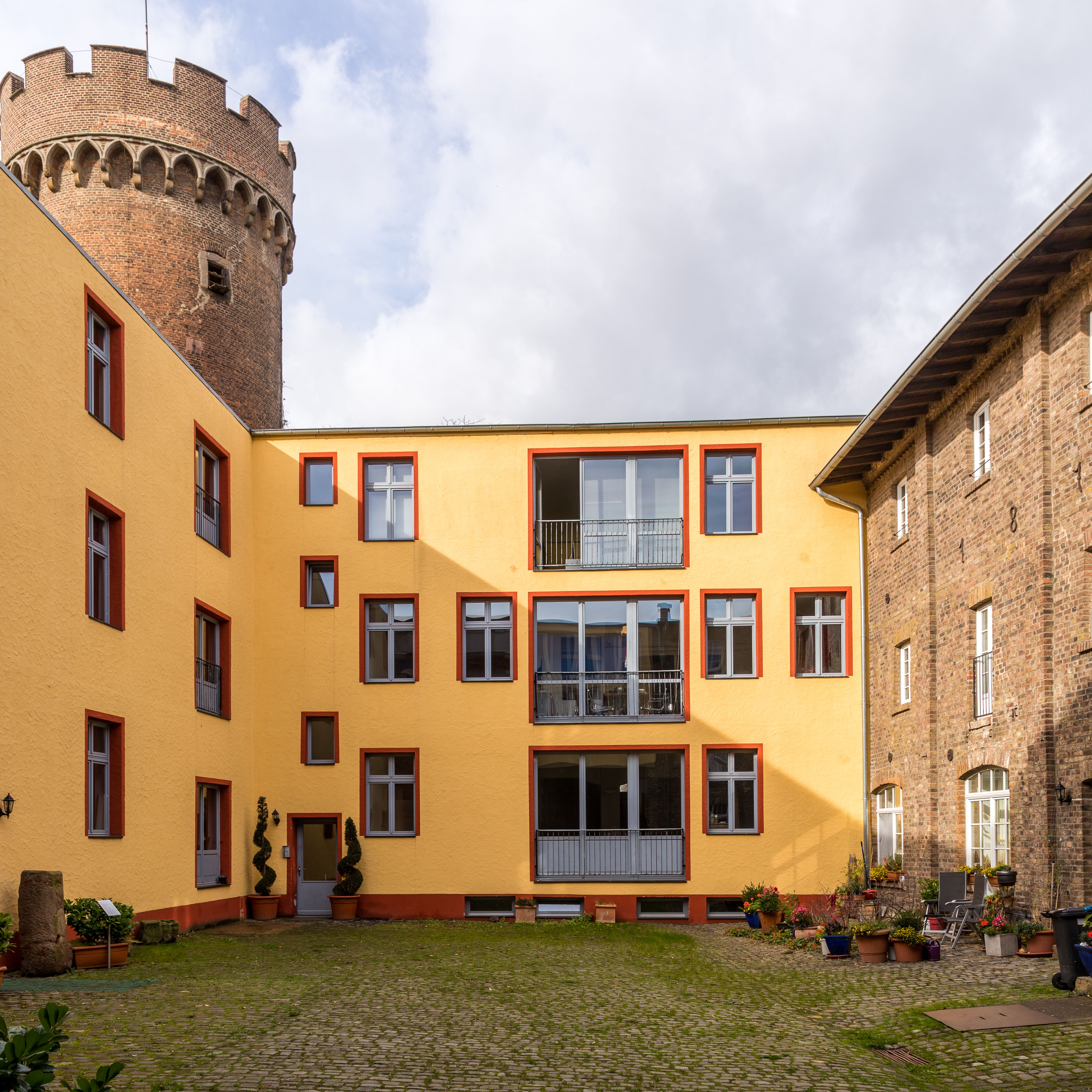 Kurkölnische Landesburg Zülpich, Innenhof